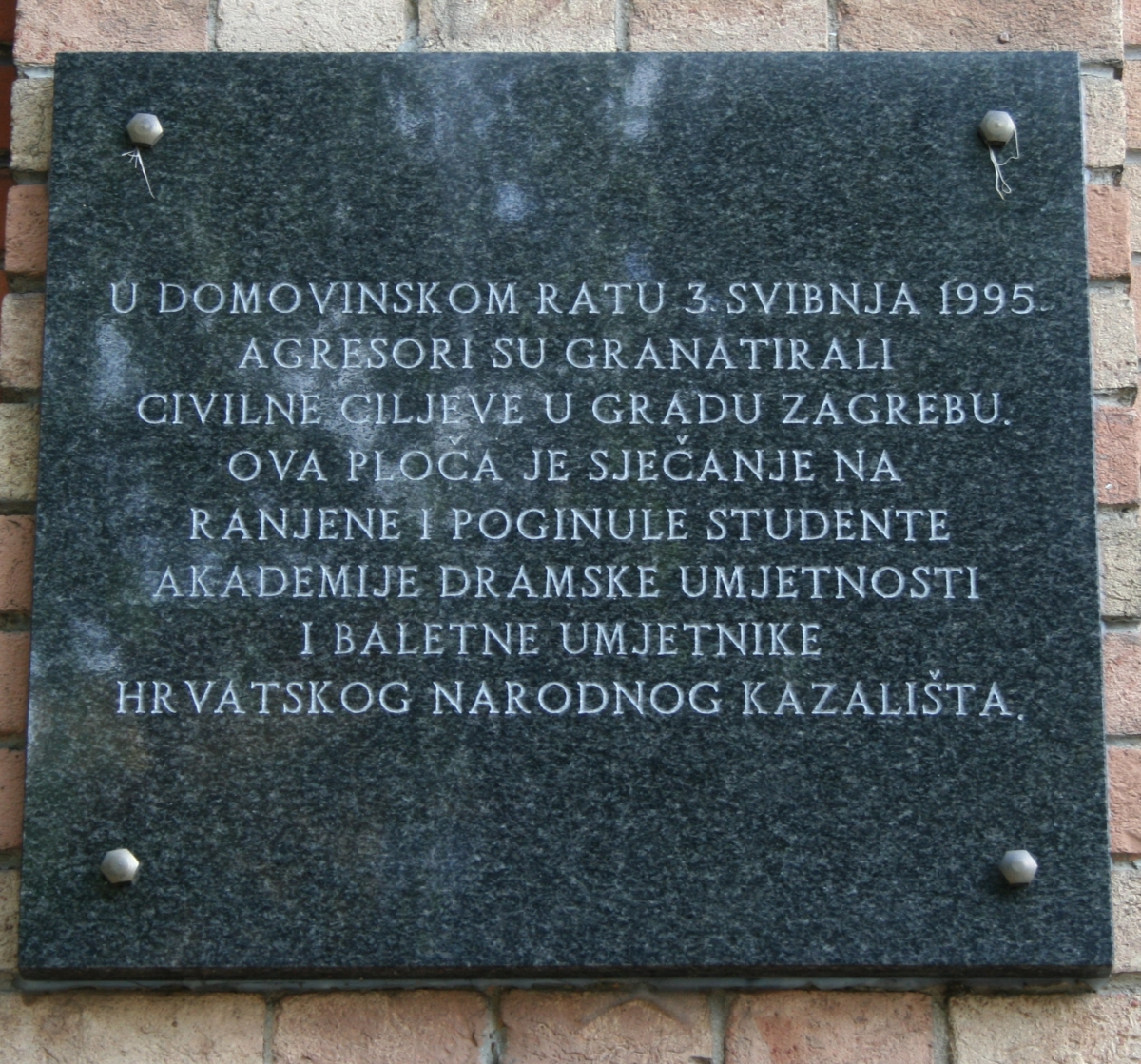 Ploča je sjećanje na ranjene i poginule studente Akademije dramske umjetnosti i baletne umjetnike HNK nastradale 3. svibnja 1995. u Zagrebu od granatiranja.